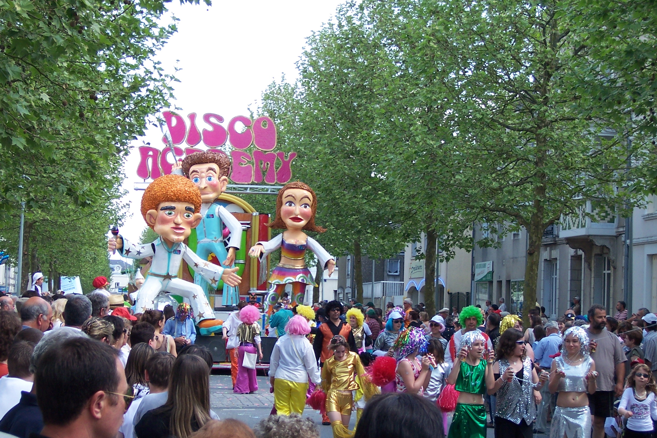 France - Deux-Sèvres - Parthenay - Cavalcade de Pentecôte 2008